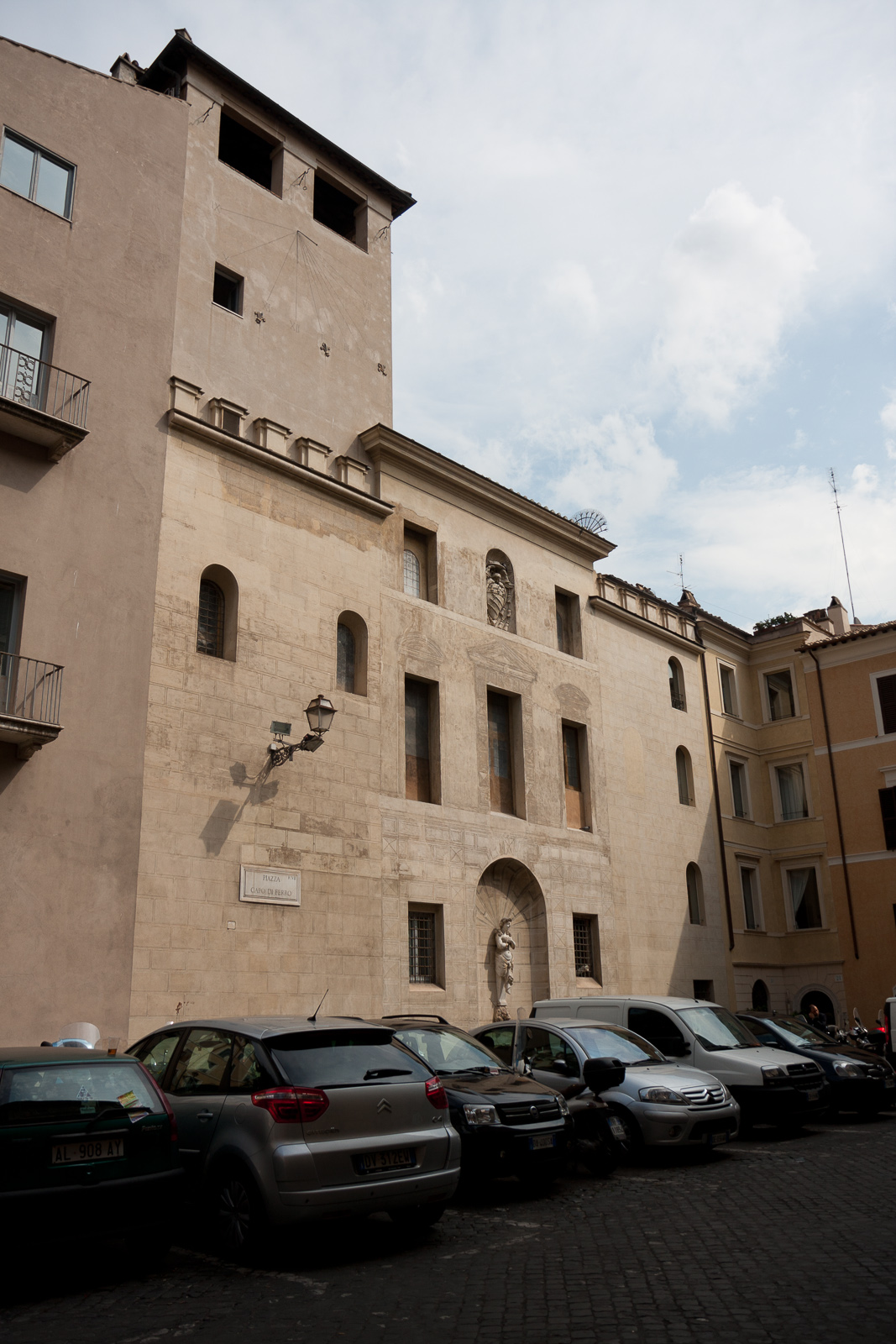 Fontana delle Mammelle